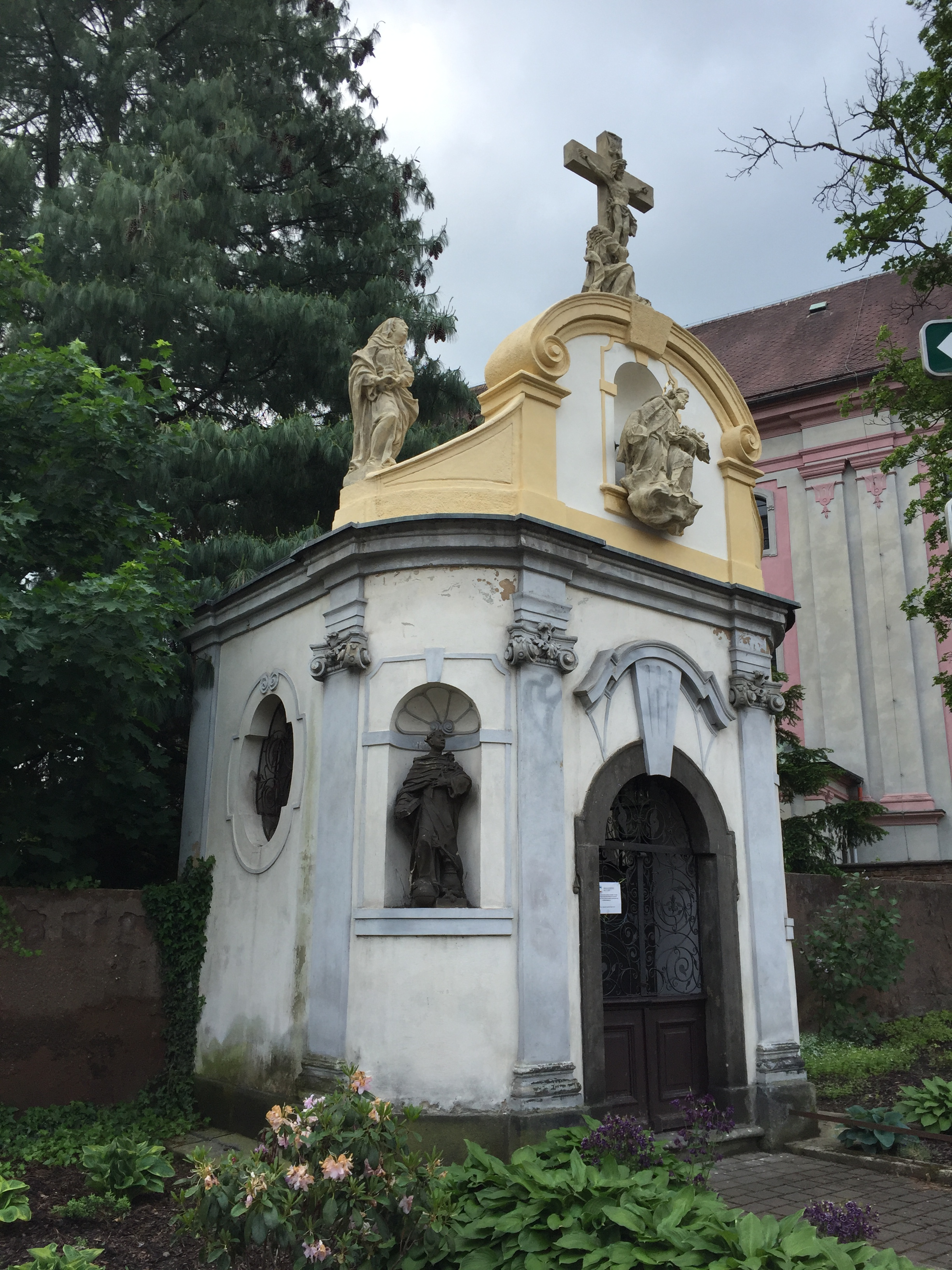 Děčín, kaple Panny Marie Pomocné směrem ke kostelu sv. Václava a Blažeje